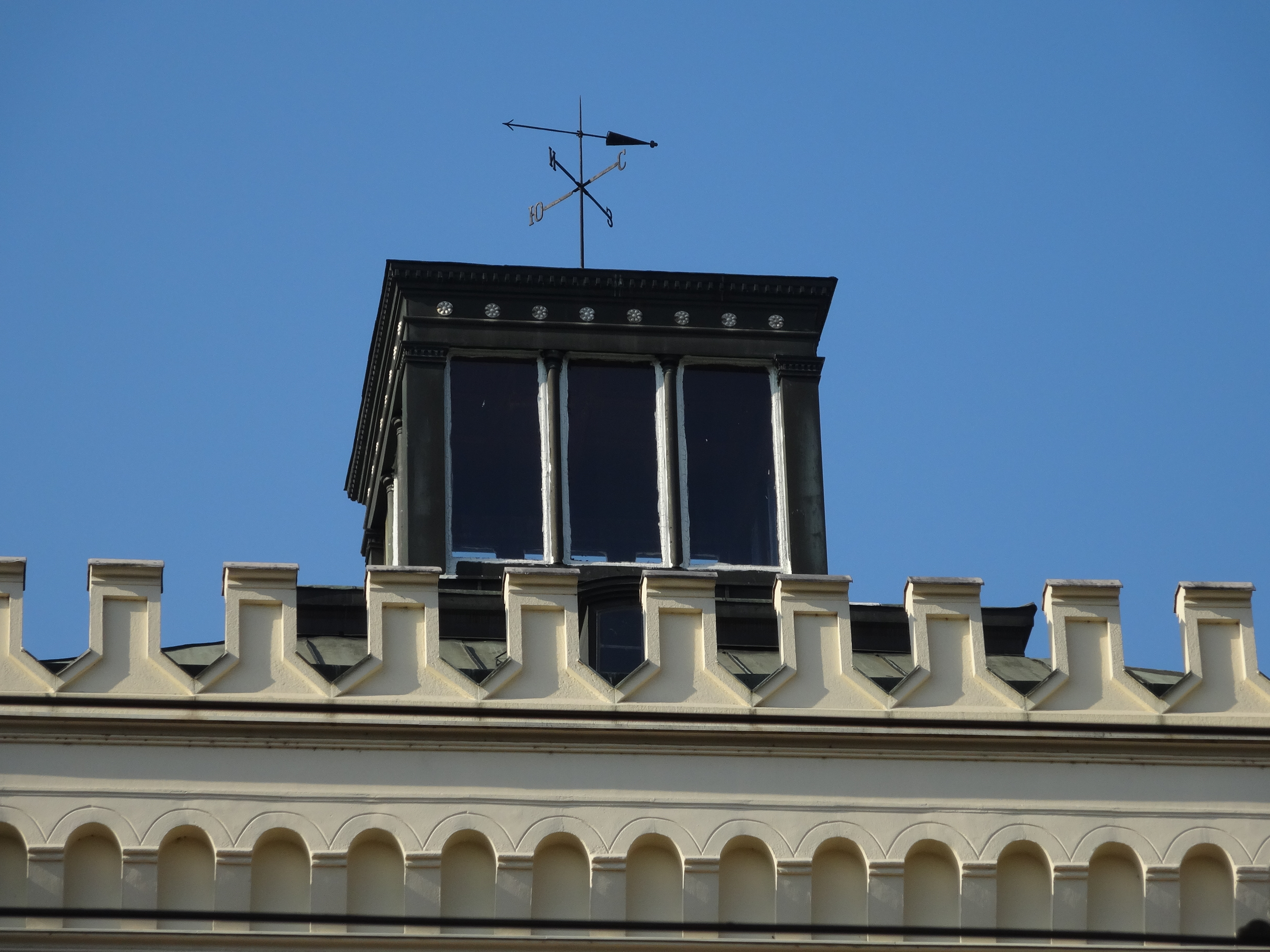 Kapetan Mišino zdanje u Beogradu, osmatračnica